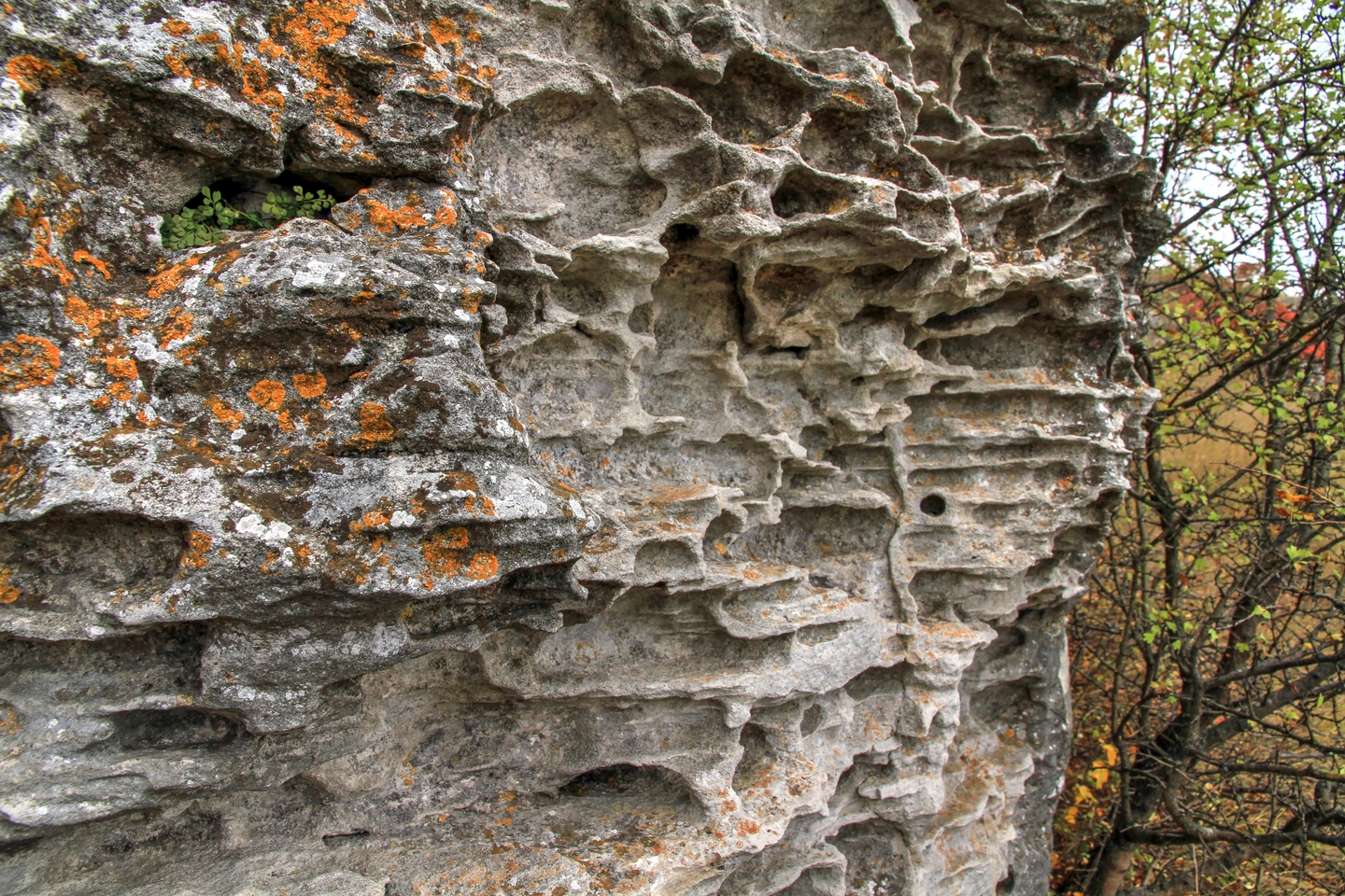 Участок крутого берега р. Днестр, монумент природы, находится в Окницкий район, Между селами Наславча и Ленкэуць, Отачское лесничество, урочище Ленкэуць, кварталы 1-3 (код MD-OC-mn.A-050) A-050